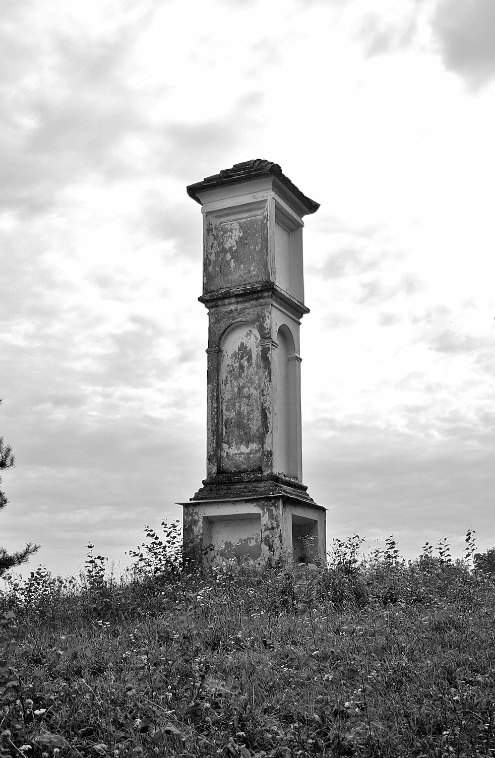 Znamenje Beli križ. Column the white cross. Die Säule das weiße Kreuz.